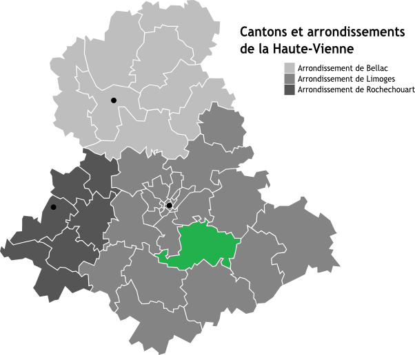 Canton de Pierre-Buffière, Limousin, France en Carte des arrondissements de la Haute-Vienne